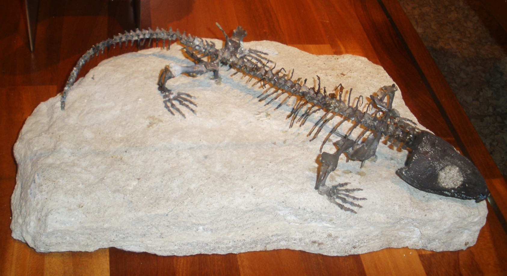 Fossil of Captorhinus, an extinct reptile- Took the photo at Museon museum, Den Haag